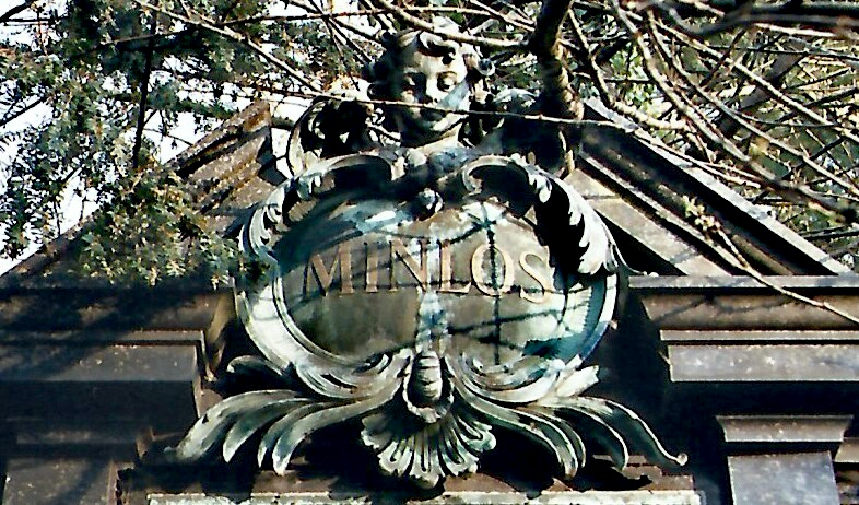 Kopf des Minlos'schen Grabmals auf dem Burgtorfriedhof zu Lübeck